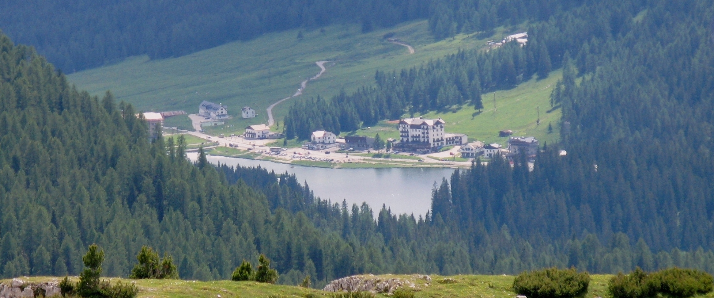 De Misurinaséi vun den Tre Cime aus gesinn. Kategorie:Séien an Italien